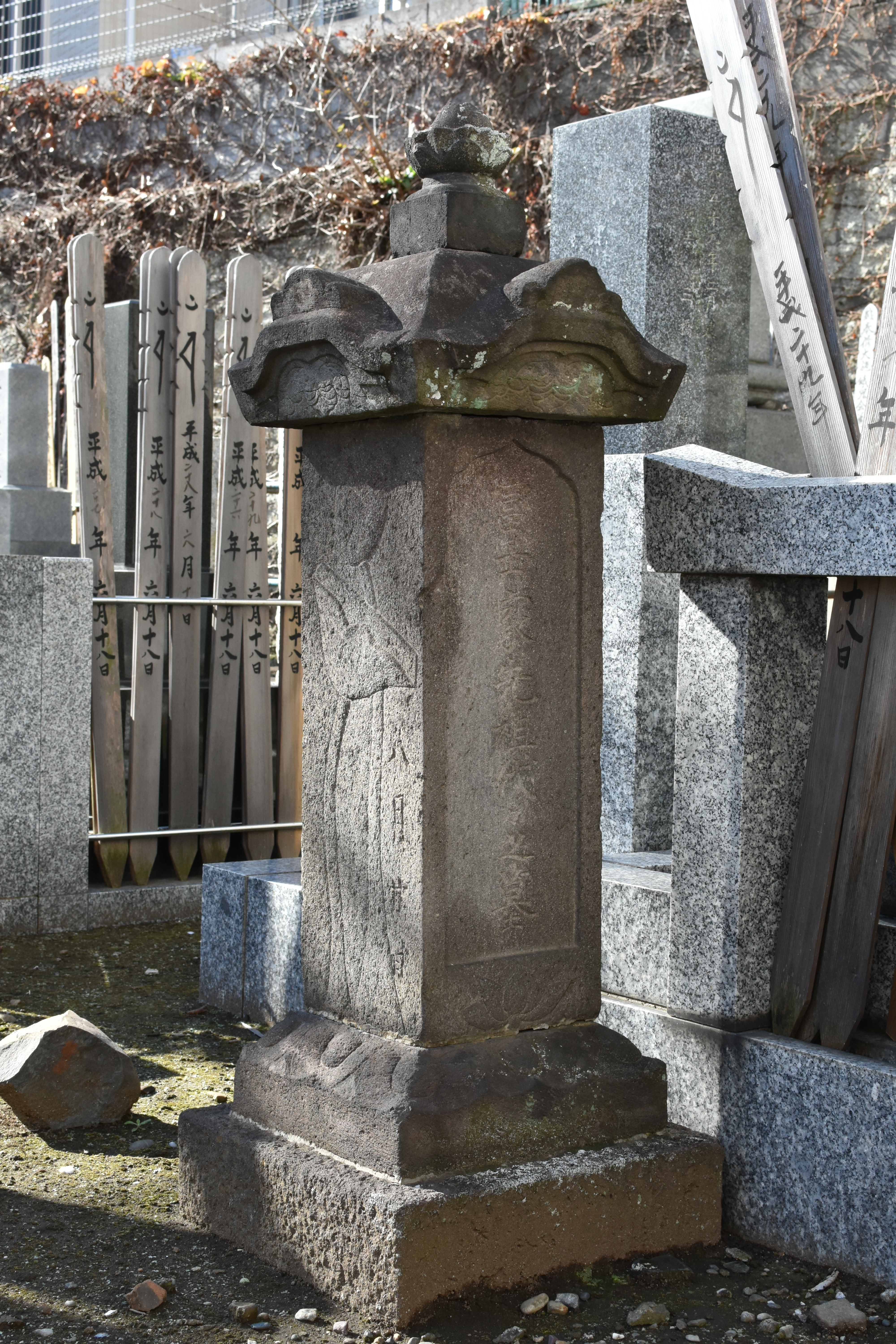 安養寺（東京都新宿区住吉町）境内にある「富士家先祖代々之墓」